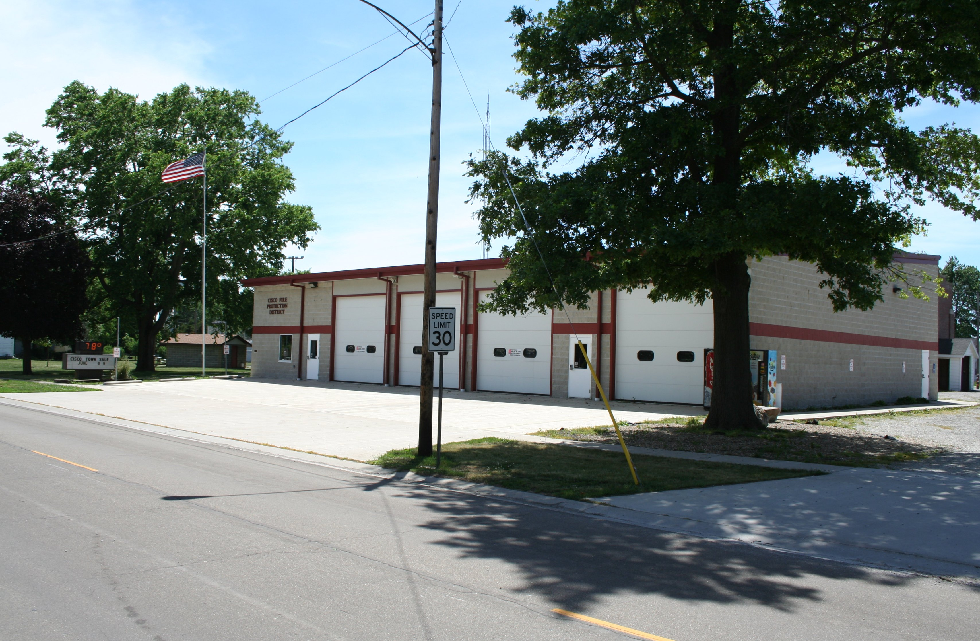 Cisco_Illinois_Fire_Station